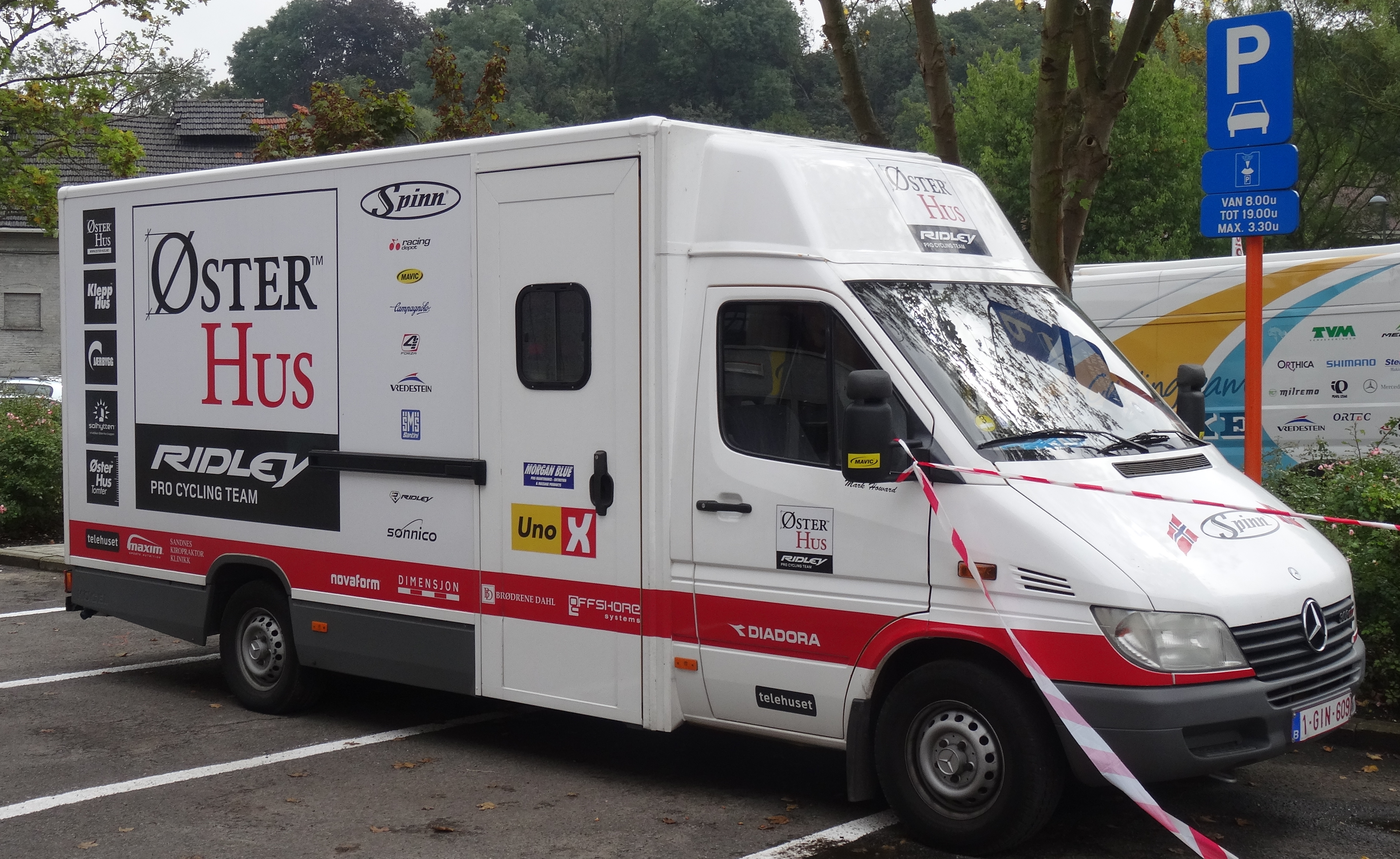 Reportage photographique réalisé le mercredi 27 août à l'occasion de l'arrivée de la Druivenkoers Overijse 2014 à Overijse, Belgique.